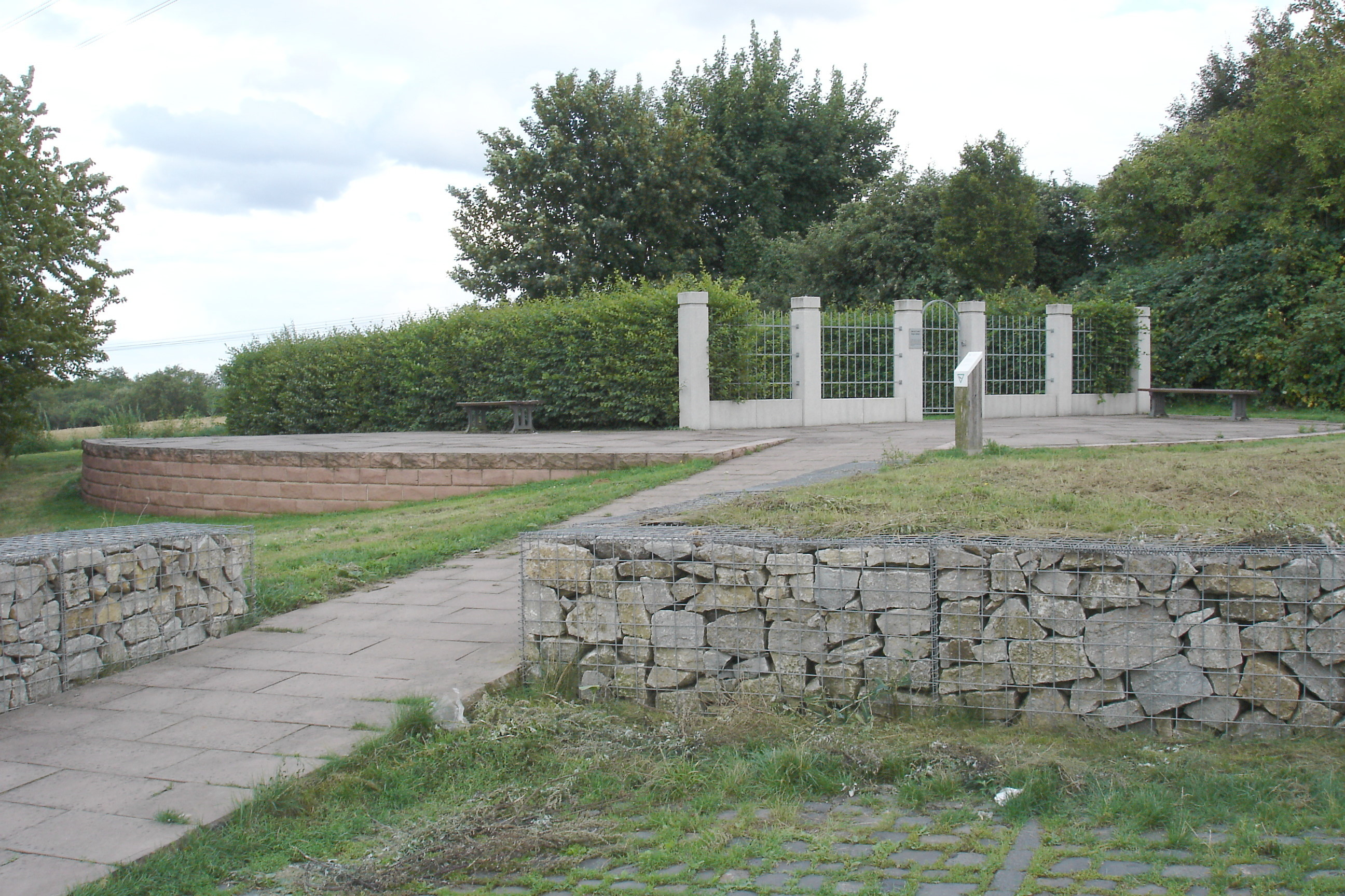 juedischer Friedhof in Ffm-Bergen-Enkheim